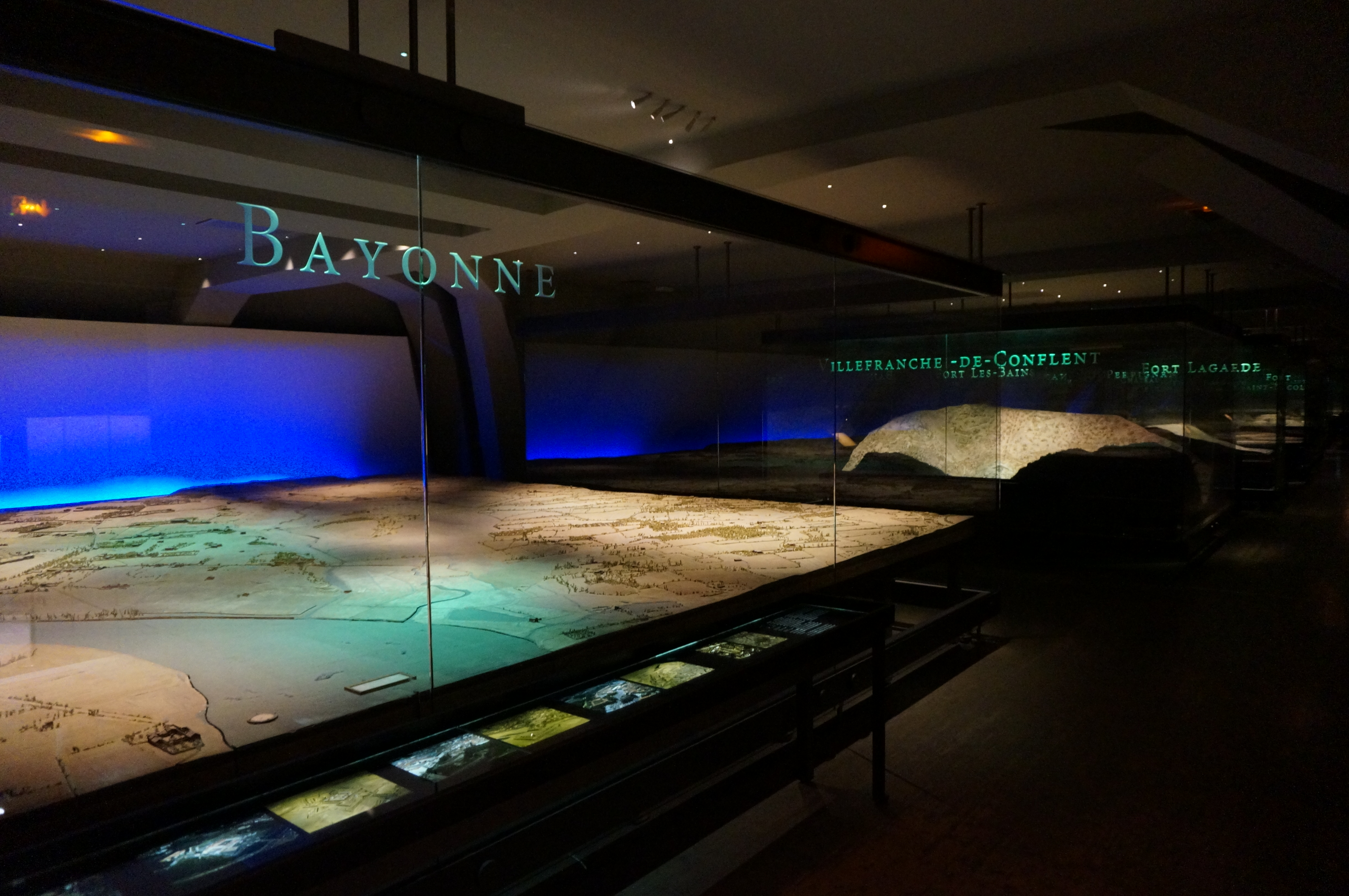 Présenté au Musée des Plans-Reliefs.